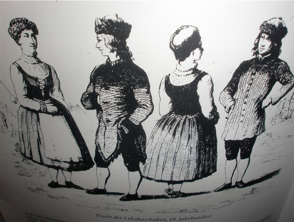 Tracht der Leba-Kaschuben